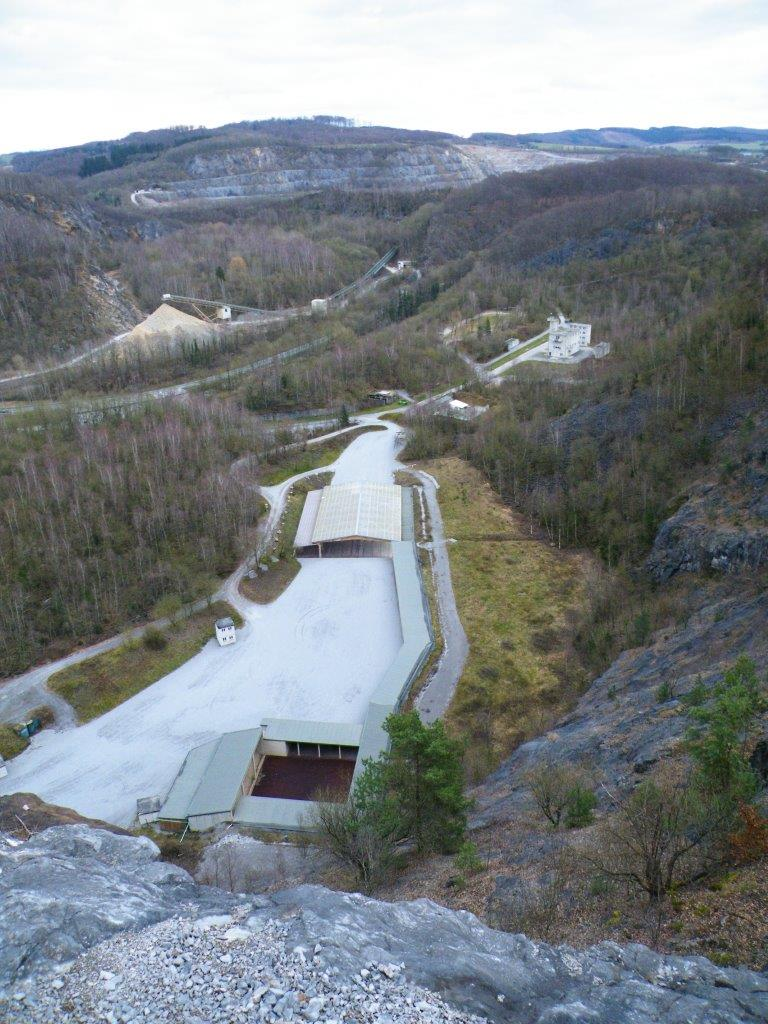 Steinbruch Emil mit Übungsgelände der Sondereinsatzkommandos (SEK) der Polizei NRW, Hemer-Deilinghofen, Märkischer Kreis. Im Bildhintergrund Steinbruch Asbeck.